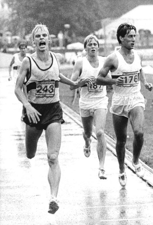 Hansjörg Kunze, Werner Schildhauer, Olaf Kampe ADN-ZB Thieme 8-8-81 Bez. Gera: DDR-Leichtathletikmeisterschaften: Sieger im 5000 Meter-Lauf der Männer wurde der Rostocker Hansjörg Kunze (l.) vor Werner Schildhauer (r.) und Olaf Kampe. Abgebildete Personen: Kunze, Hansjörg, DDR-Leichtathlet Schildhauer, Werner, DDR-Leichtathlet Olaf Kampe, DDR-Leichtathlet